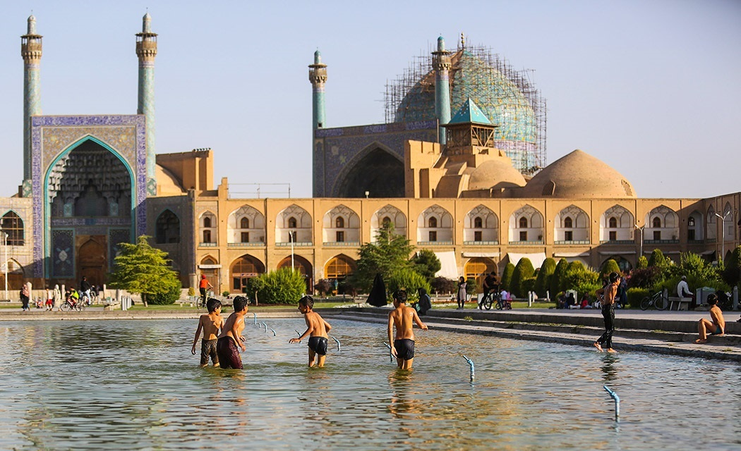 آب تنی چند کودک در میدان نقش جهان اصفهان مرداد 1399